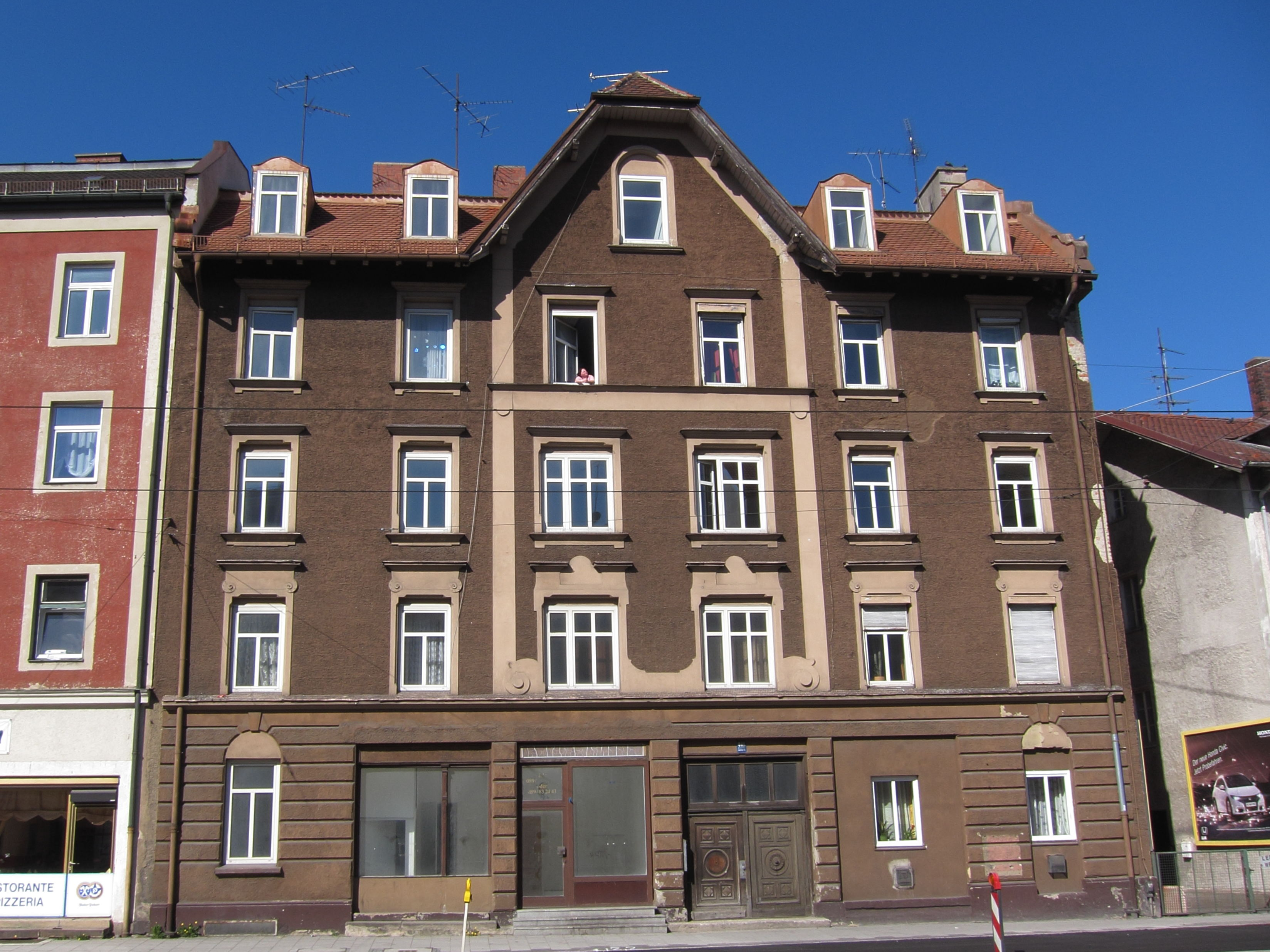 Landsberger Straße 448; Mietshaus, deutsche Renaissance, 1900 von Josef Schreyer.